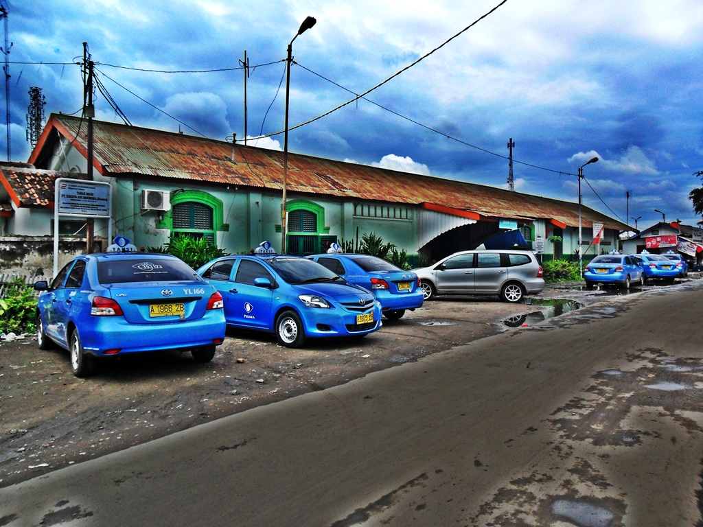 Bagian Luar Stasiun Cilegon